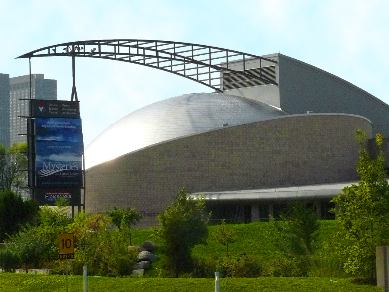 Ontario Science Center.